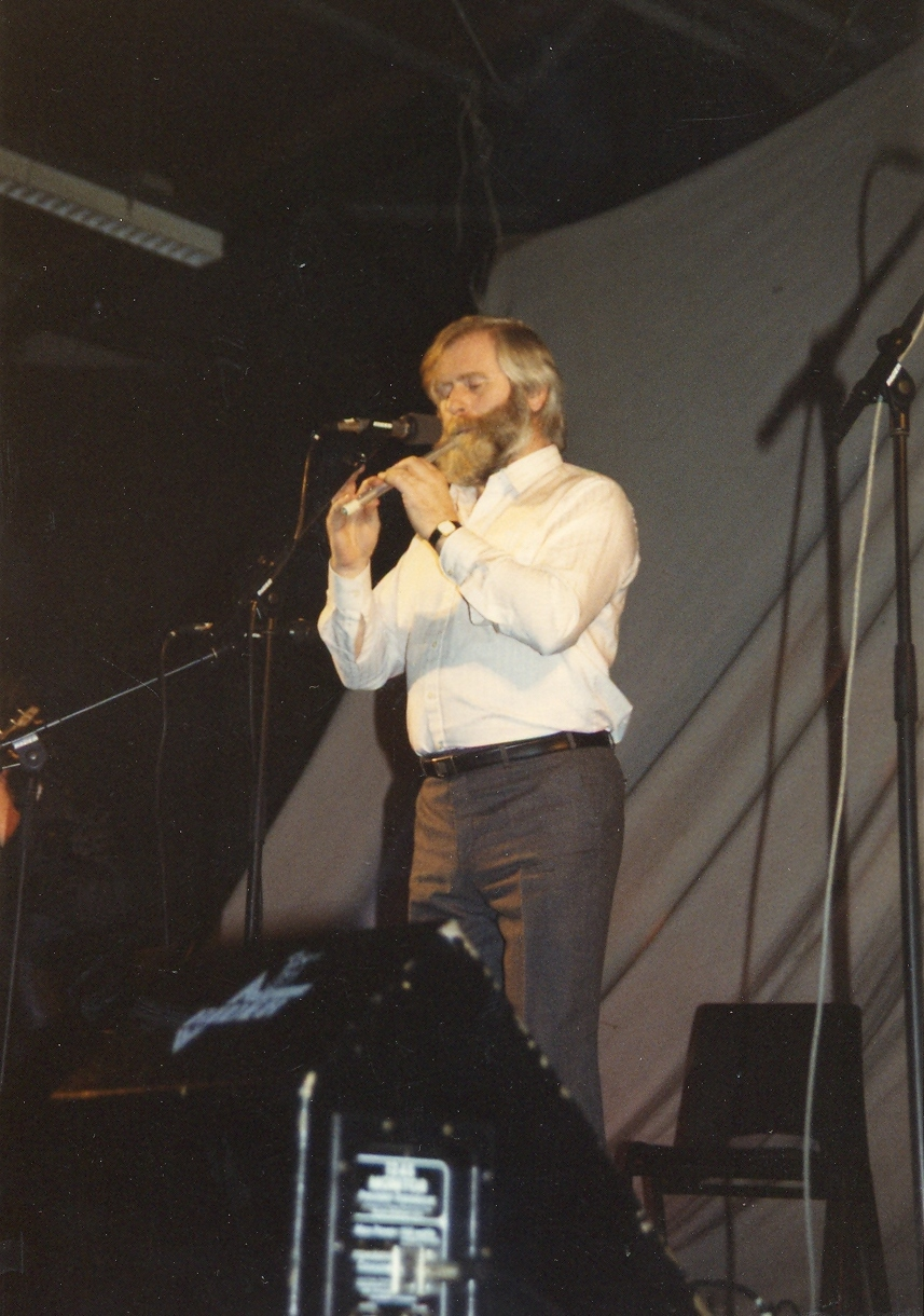 Zelfgemaakte foto tijdens een concert in Eindhoven. Foto: Aloys Soullie